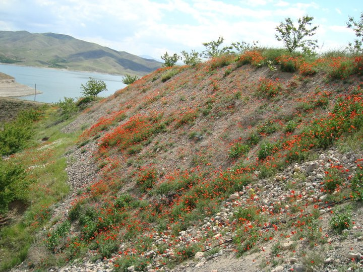 Baskil'de gelincikler.